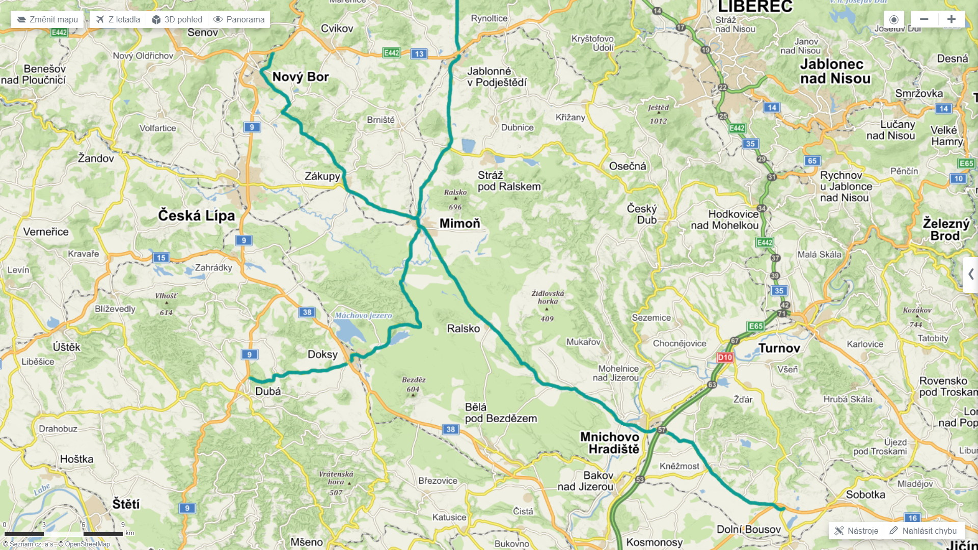 Křížení hlavních průtahových silnic ll/270 a ll/268 městem Mimoň